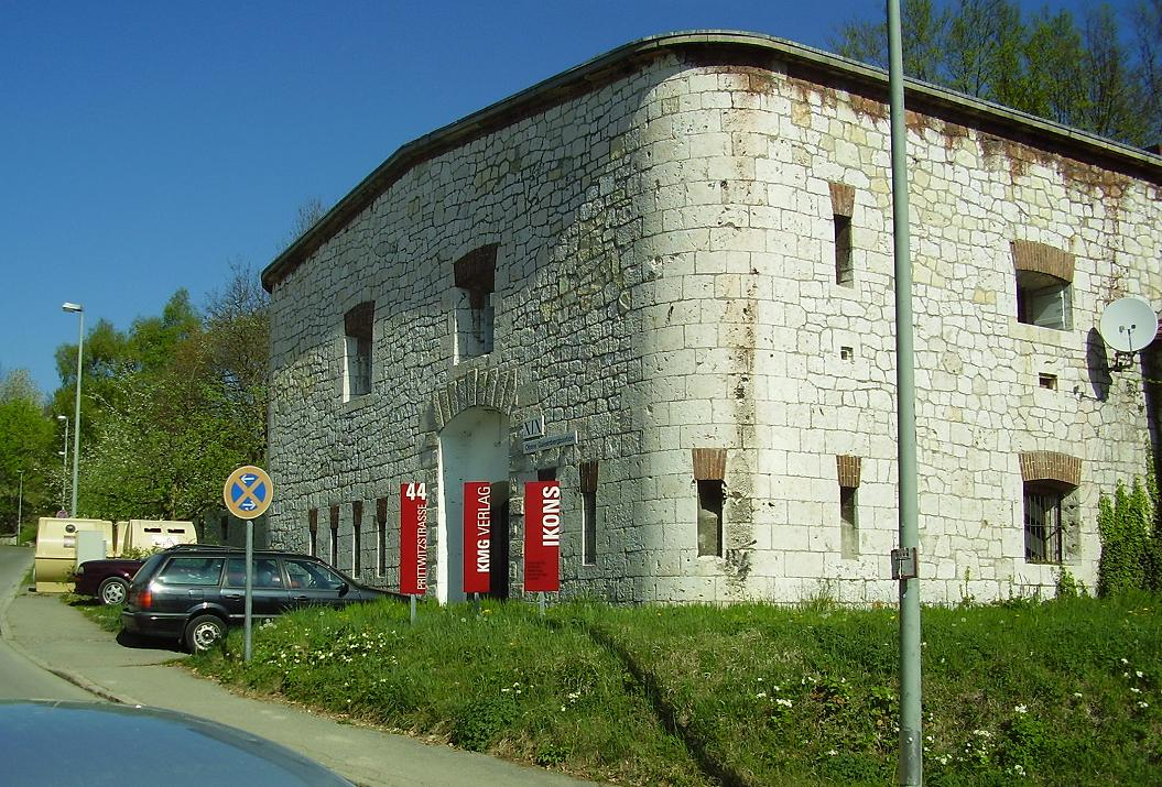 Die Obere Gaisenbergbastion der Bundesfestung Ulm